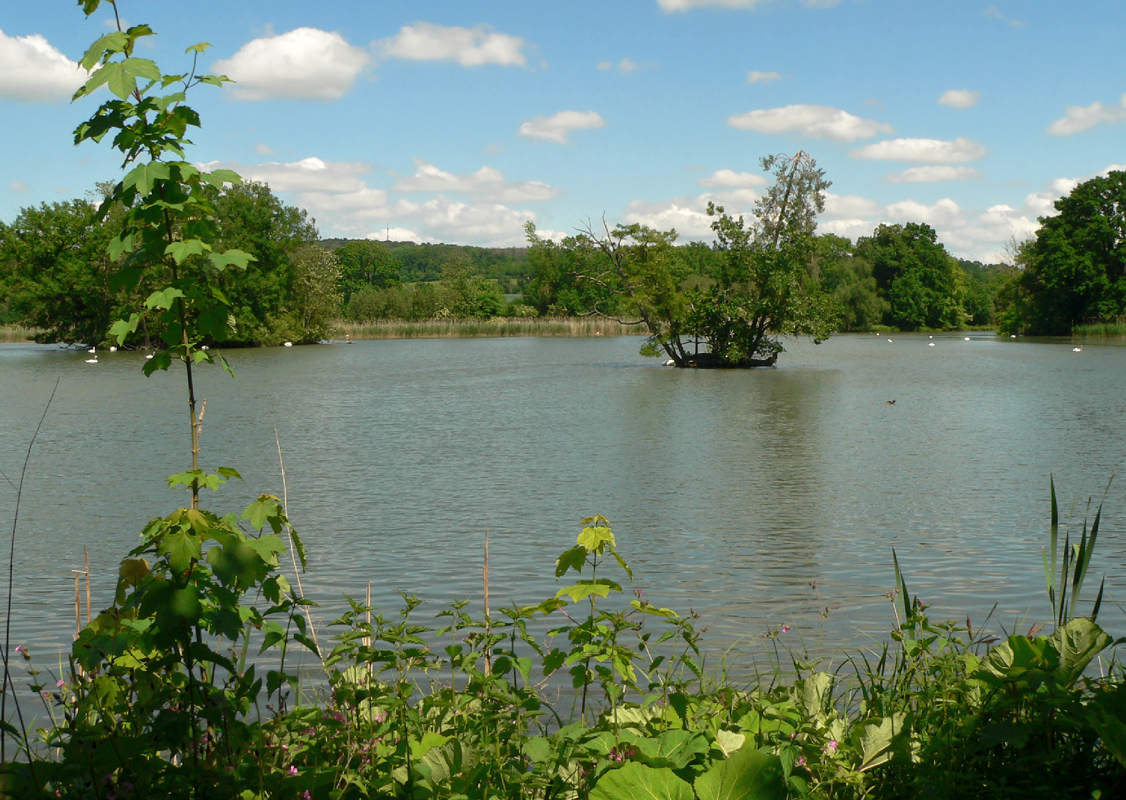 Mariensee der Derneburger Teiche mit zwei Inseln im NSG Mittleres Innerstetal mit Kanstein